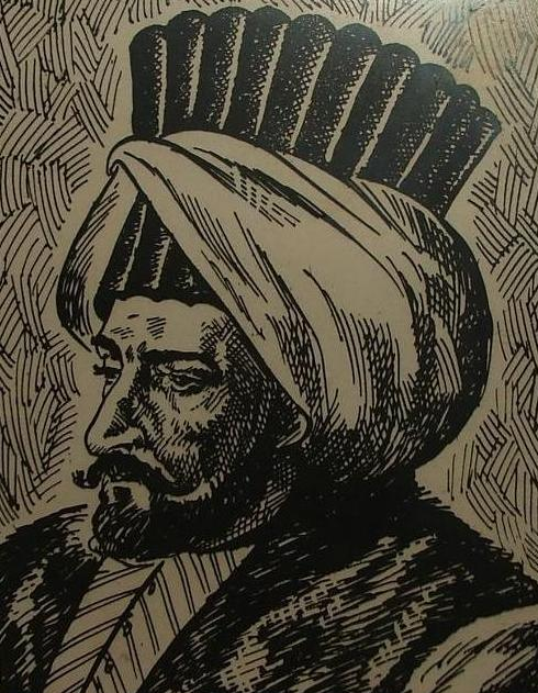 Divan şairlerimizden Nedim'in, el çizimi (dia) resmi.Bu Dia Resim kendi koleksiyonumda bulunmaktadır.